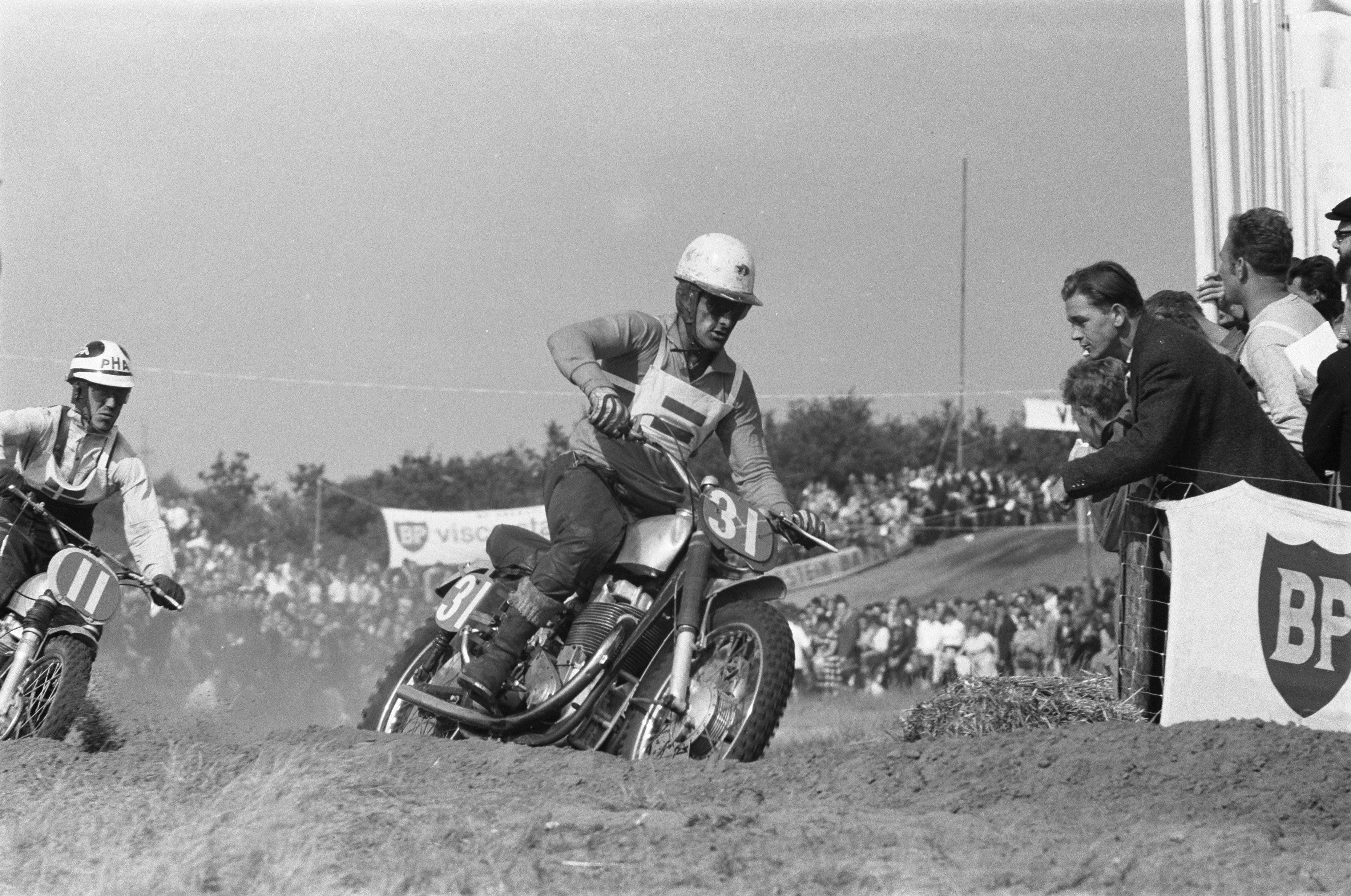 Collectie / Archief : Fotocollectie Anefo Reportage / Serie : [ onbekend ] Beschrijving : Motorcross in Schijndel Datum : 27 augustus 1961 Locatie : Noord-Brabant, Schijndel Trefwoorden : MOTORCROSS Fotograaf : Pot, Harry / Anefo Auteursrechthebbende : Nationaal Archief Materiaalsoort : Negatief (zwart/wit) Nummer archiefinventaris : bekijk toegang 2.24.01.05 Annotatie : Met nr. 31 Jan Clynk, Met nr. 11 Palle-Horts Andersen (Denemarken) Bestanddeelnummer : 912-8692